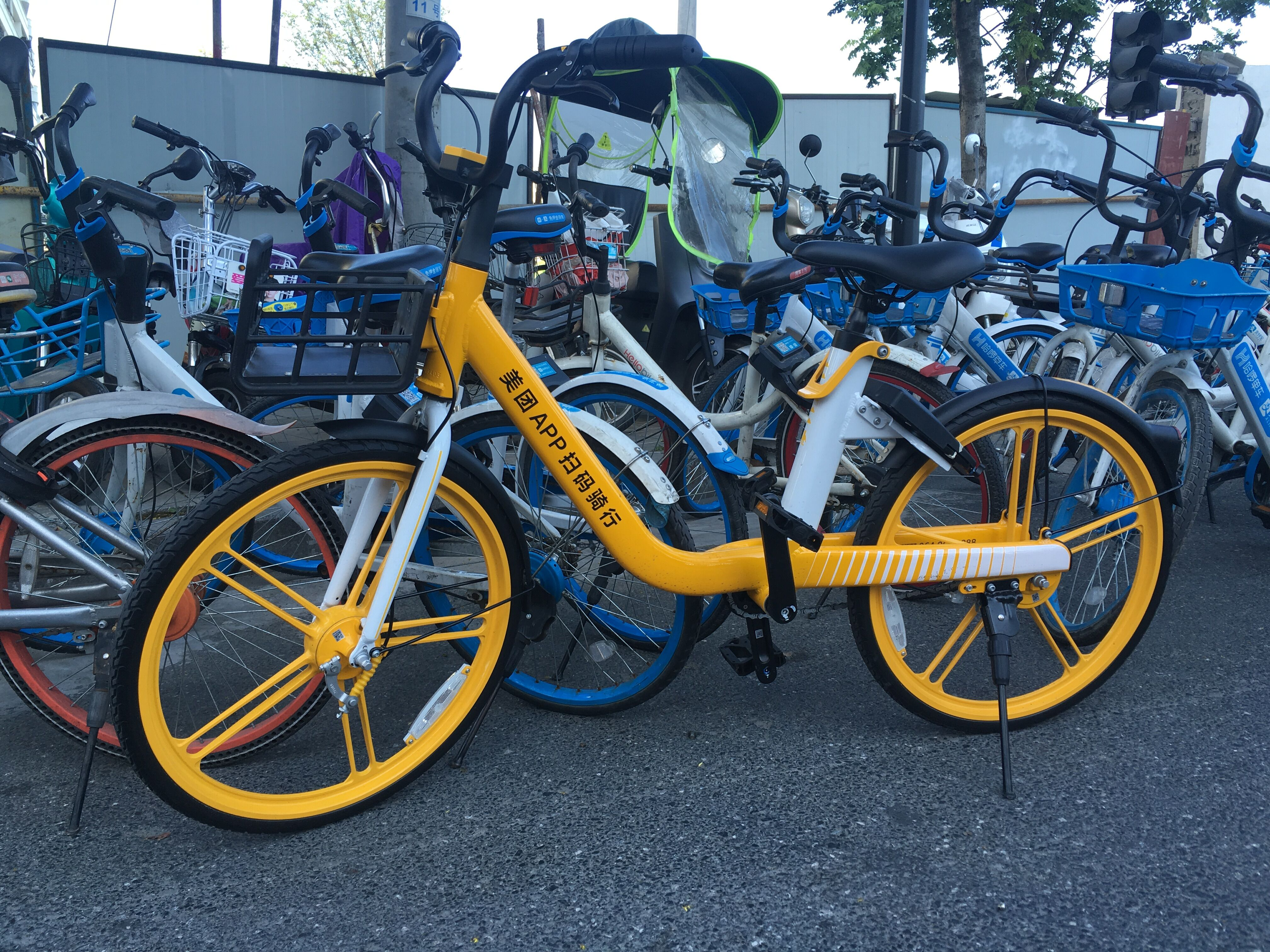 美团版的摩拜New Lite,车身为黄色